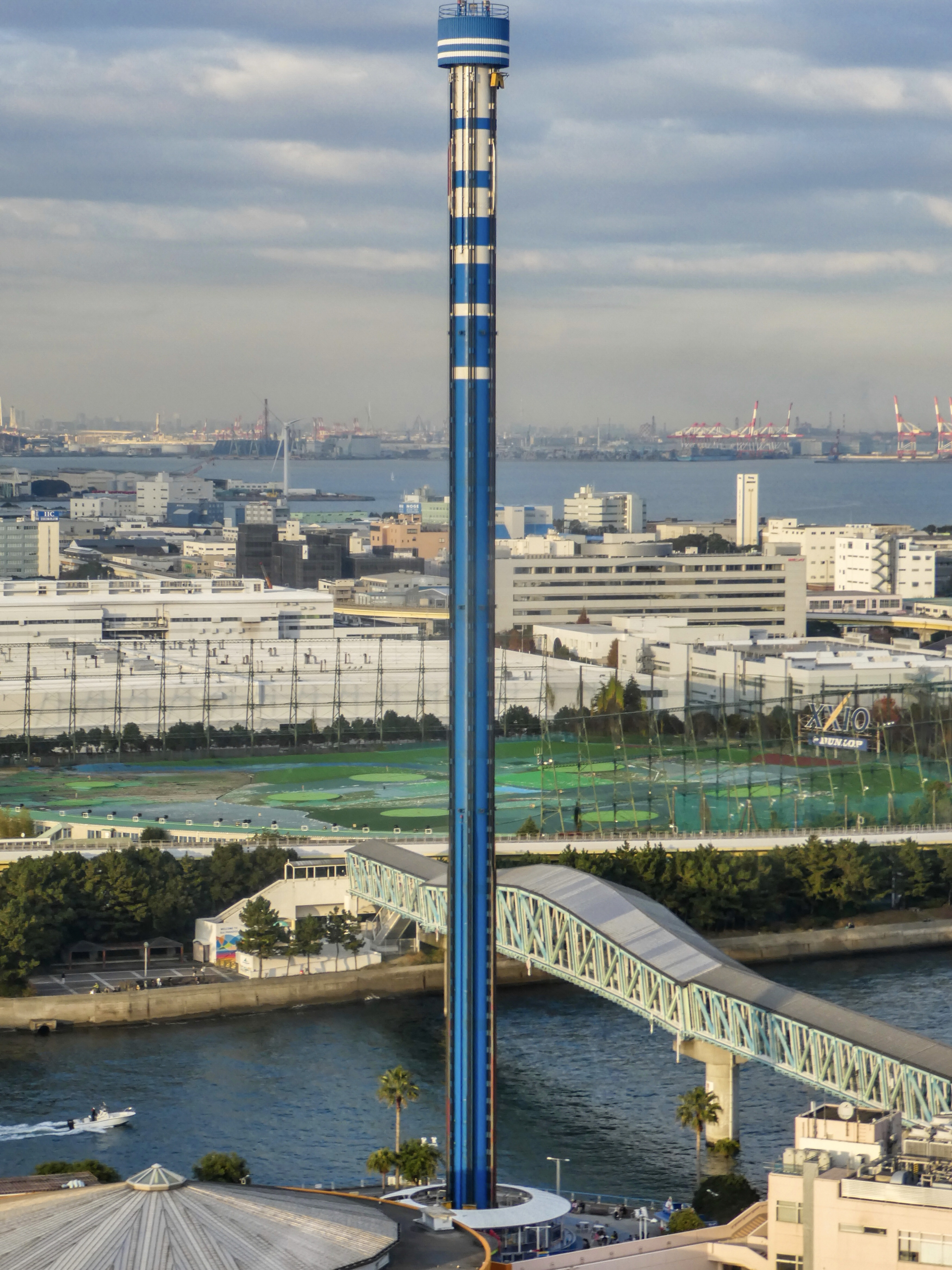 横浜・八景島シーパラダイス内のブルーフォールを撮りました。